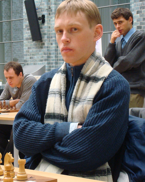 GM Alexander Goloshchapov Ukraine, Schachbundesliga 2008